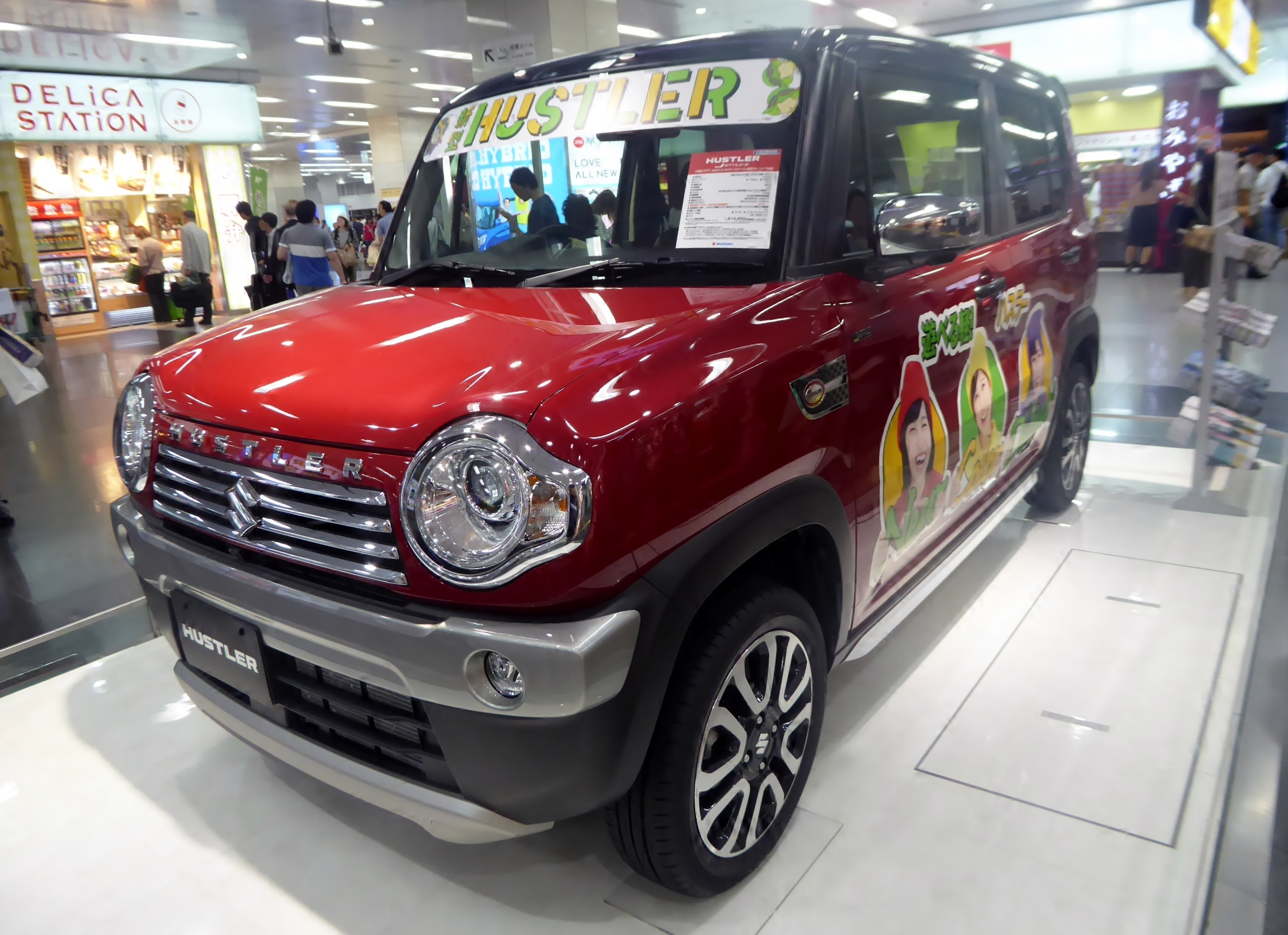 DAA-MR41S型スズキ・ハスラーJスタイルII 4WDをフロントから撮影。